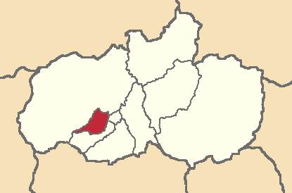 Mapa localizador del cantón en Tungurahua, Ecuador